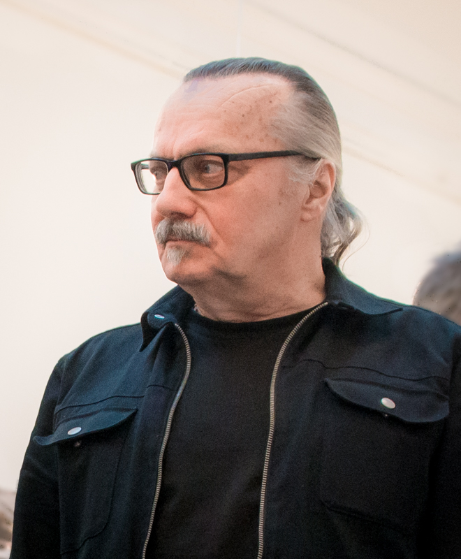 Sune Nordgren i samband med inviningen av utställningen INSIDE - Architecture på Konstakademien den 3 februari 2018.